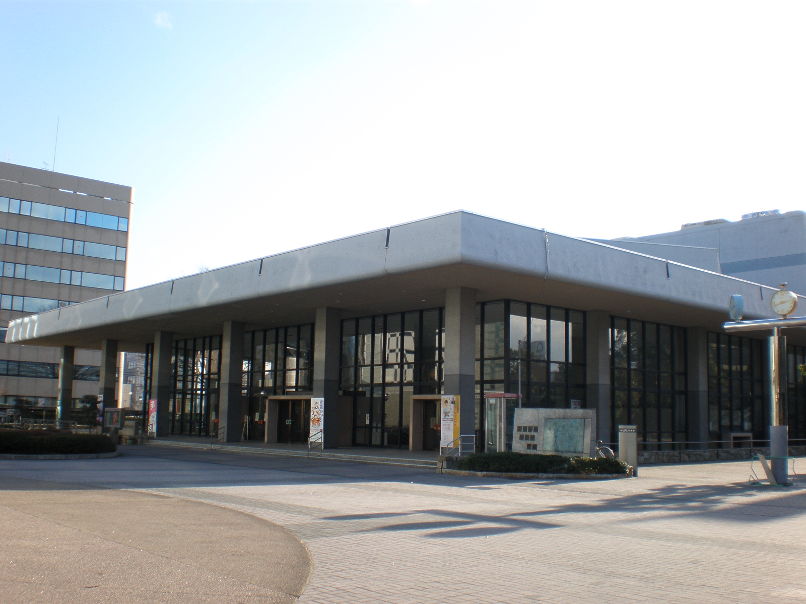 愛知県春日井市にある春日井市民会館